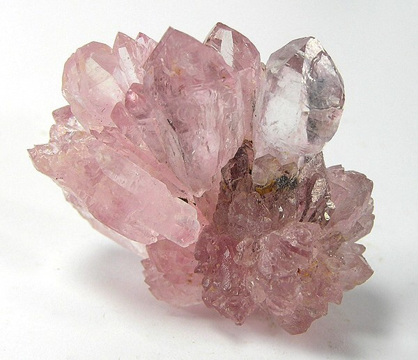 Thạch anh hồng thô